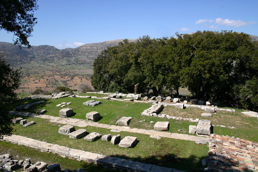 Храм Артемиды Гемеры